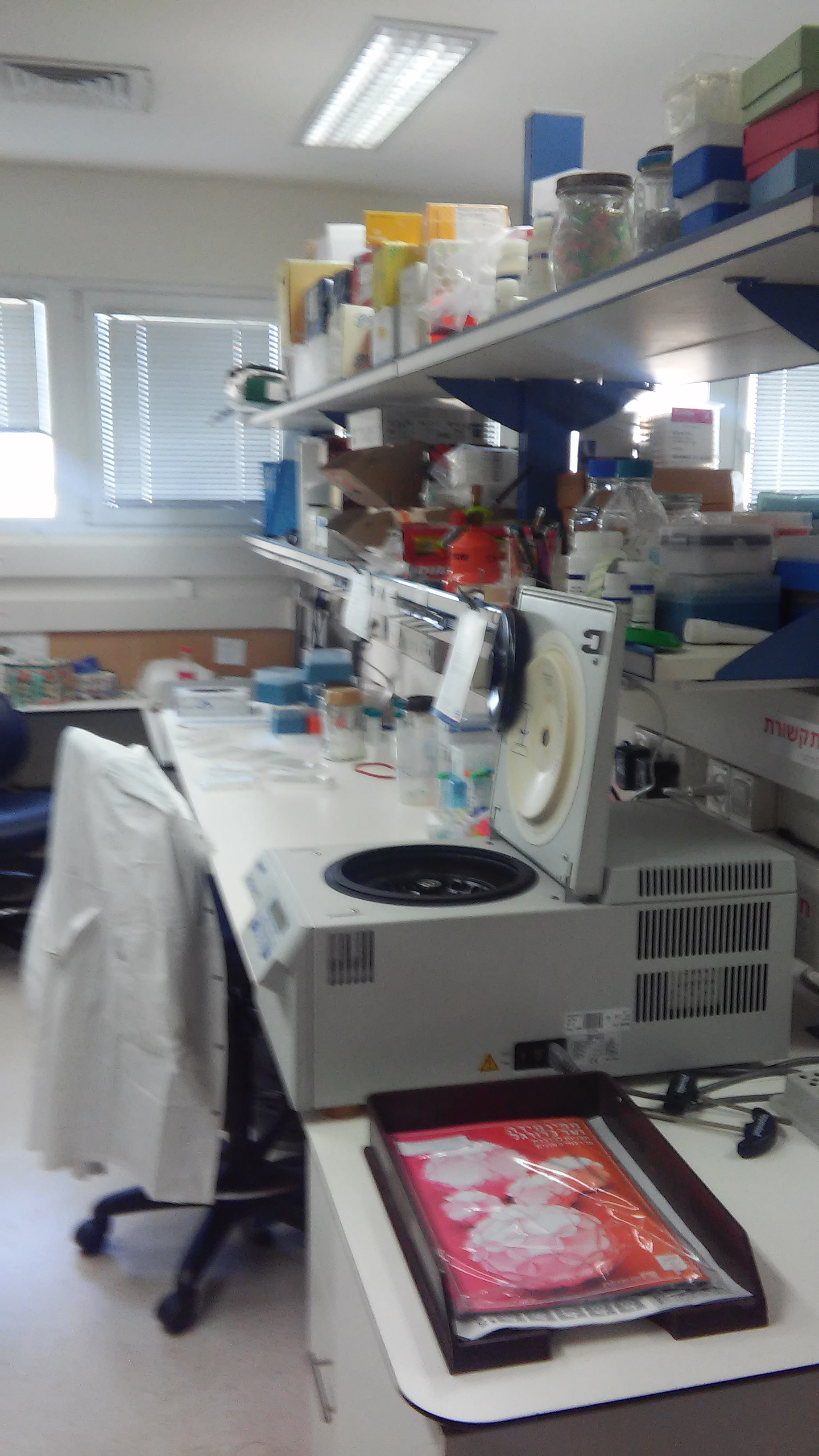 Biology laboratories in Weizmann This image was taken as part of the Elef Millim project trip to the laboratories in the Weizmann Institute of Science which was held on Friday, 15th April 2016. To view all images uploaded as part of the Elef Millim Project